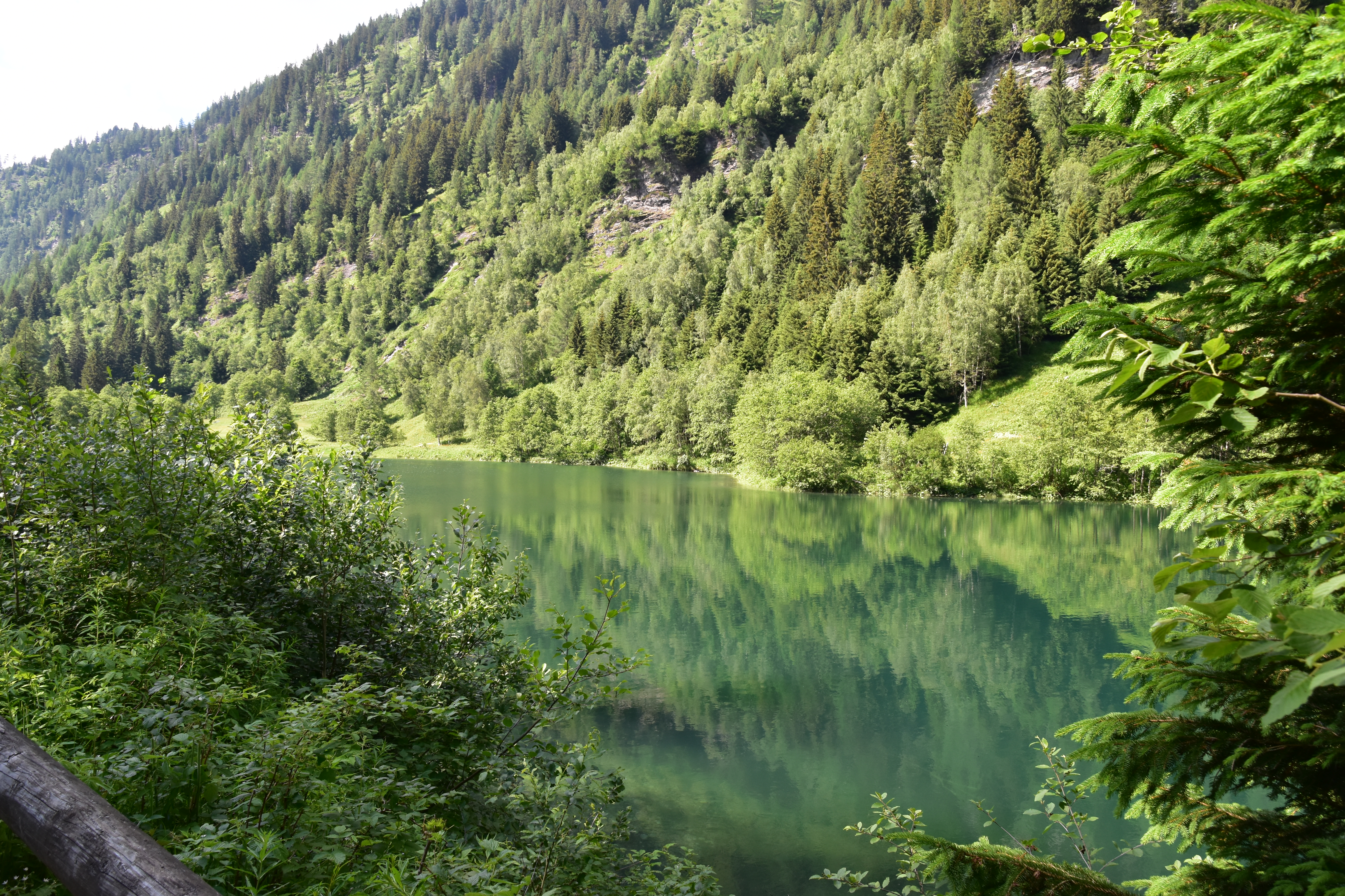 Aufgestaute Mur zwischen Arsenhaus und Muritzen